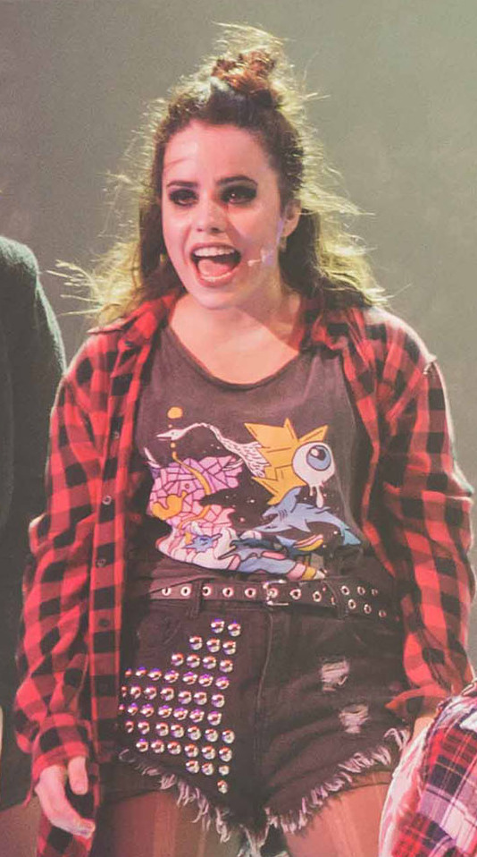 El elenco de American Idiot compuesto por Germán “Tripa” Tripel (St. Jimmy), Mariu Fernández (Extraordinary Girl), Francisco Eizaguirre (Johnny), Sofía Val (Whatsername), Sofía Morandi (Heather), Leandro Bassano (Will), Cristian Centurión (Tunny), Franco Friguglietti (Gerard), Julián Rubino (Theo) y Tatiana Luna (Alysha).